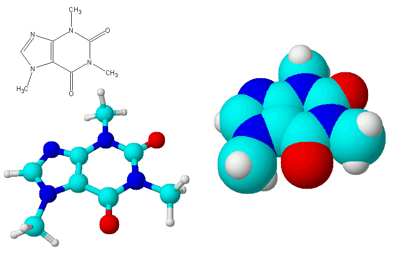 Cafeïne-molecuul. Rood = zuurstof, lichtblau = koolstof, donkerblauw = stikstof, wit = waterstof